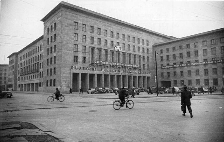 Berlin, Leipziger Straße, Deutsche Wirtschaftskommission Das Gebäude der Deutschen Wirtschafts-Kommision Leipziger-Ecke Wilhelmstrasse in Berlin.Zentralbild-Pe.-8.1.1949